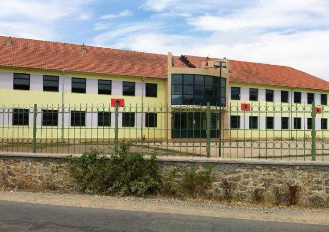 Shkolla e mesme e bashkuar